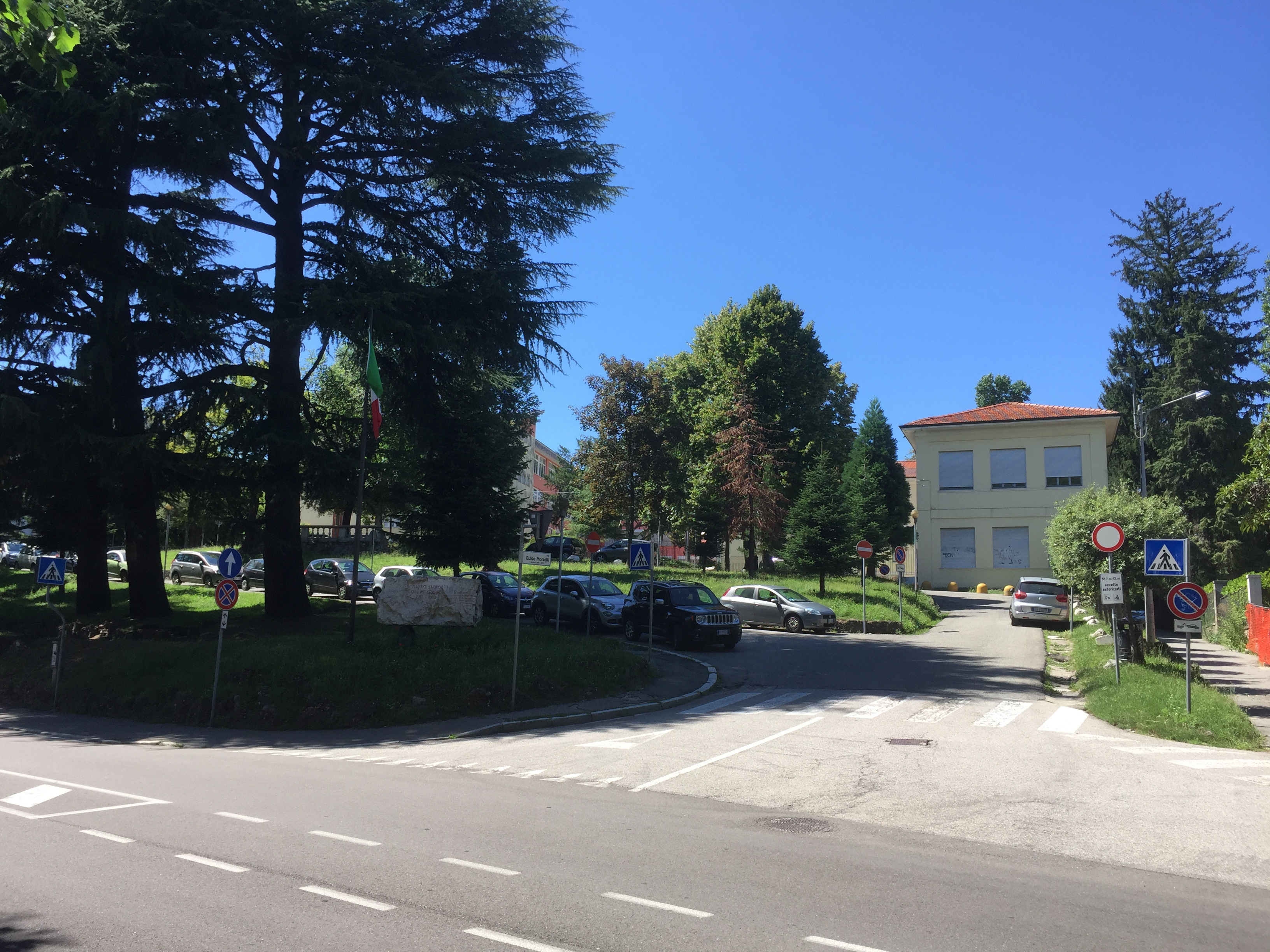 Vista da viale XXV Aprile del complesso del Liceo Classico Ernesto Cairoli di Varese